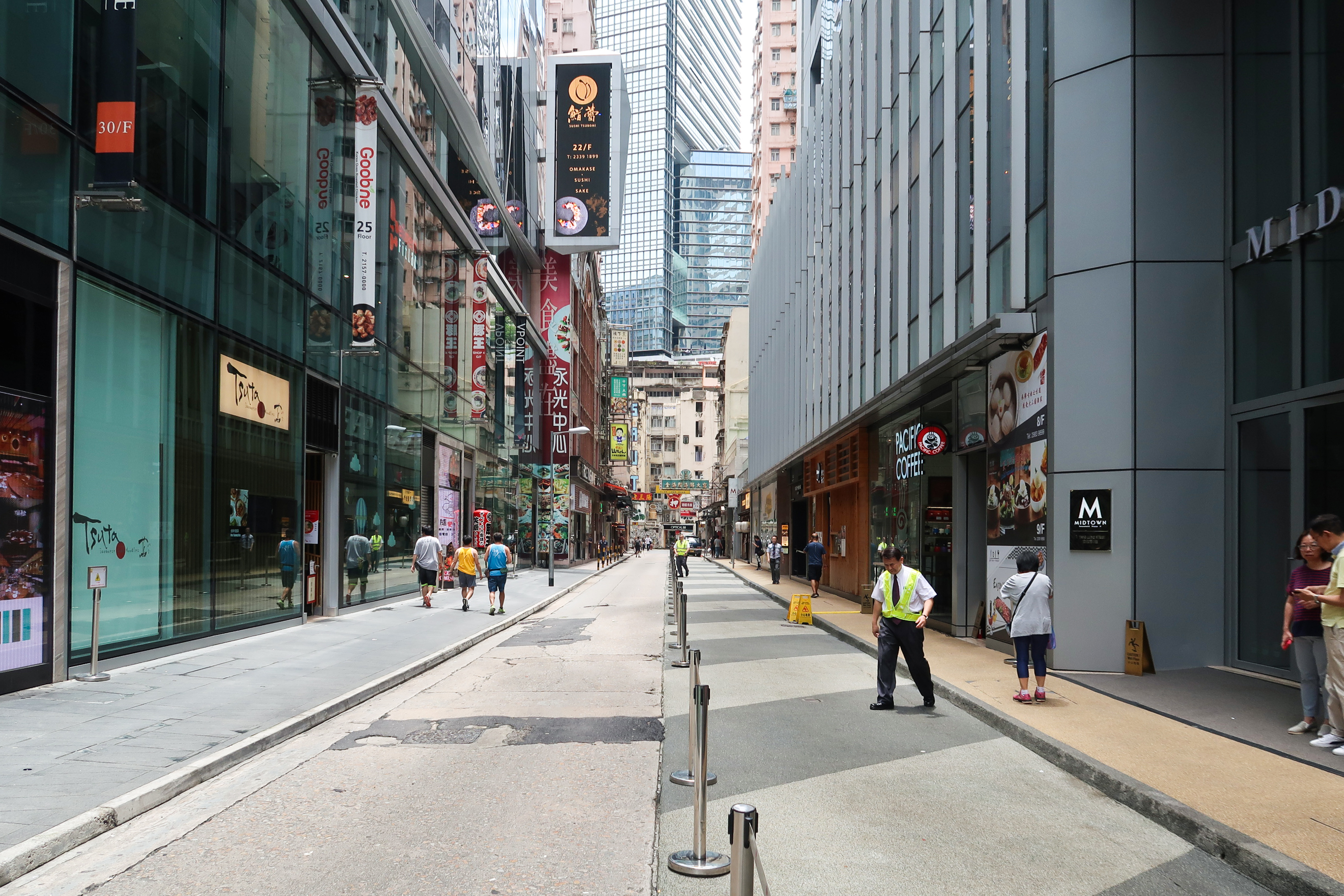 Tang Lung Street